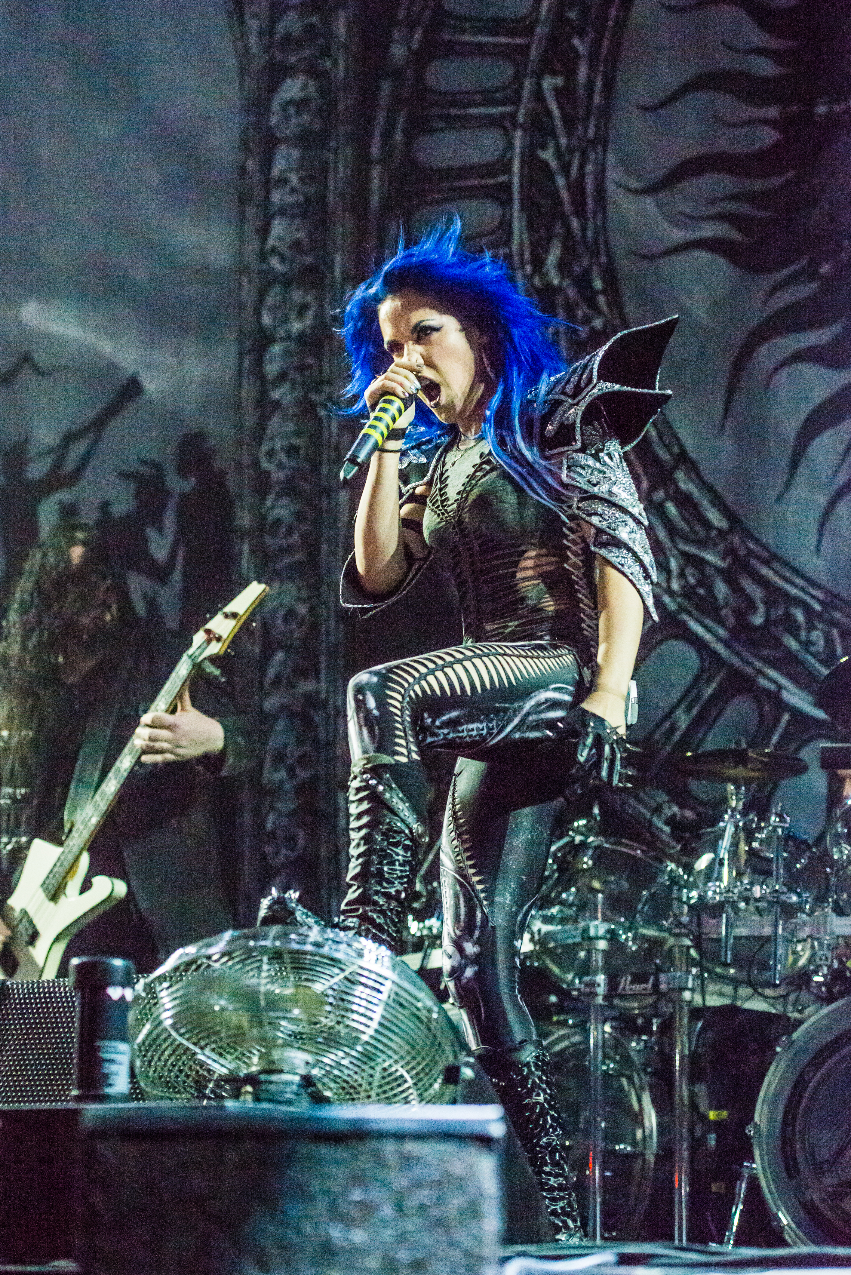 'Arch Enemy - Support für Nightwish Endless forms most beautiful Tour 2015 Oberhausen'